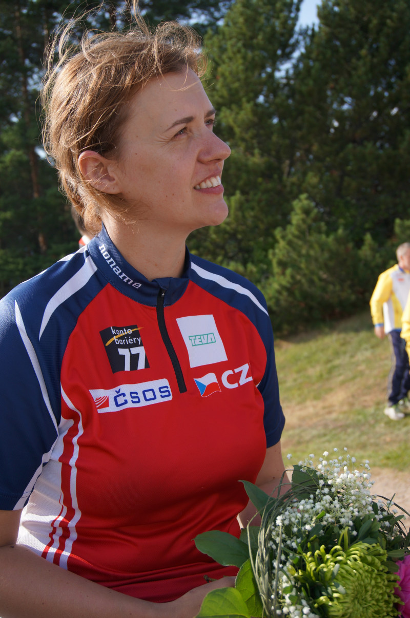 Mistryně světa v orientačním běhu z Vuokatti 2013 Jana Kosťová